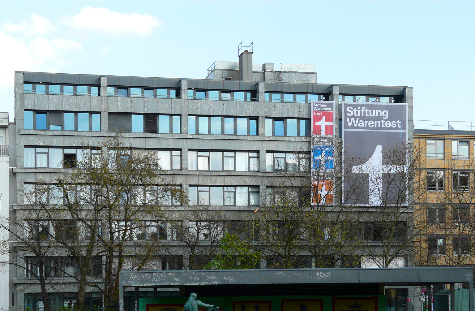 Stiftung Warentest - Gebäude am Lützowplatz in Berlin